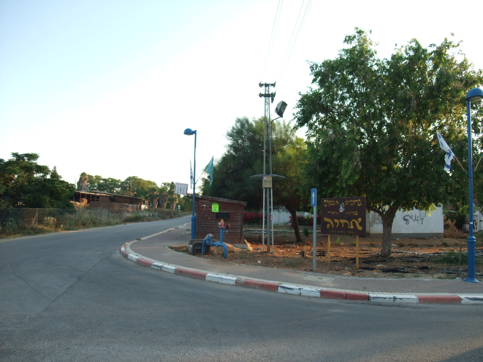 מרכז כפרי אחווה